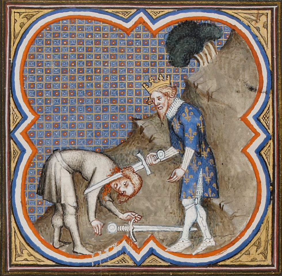 Vengeance de Clovis. Clovis décapite le guerrier franc, qui après la bataille de Soissons avait brisé le vase liturgique que le roi voulait rendre à l'évêque de Reims. Grandes Chroniques de France de Charles V. Paris, XIVème siècle. Bibliothèque nationale de France.